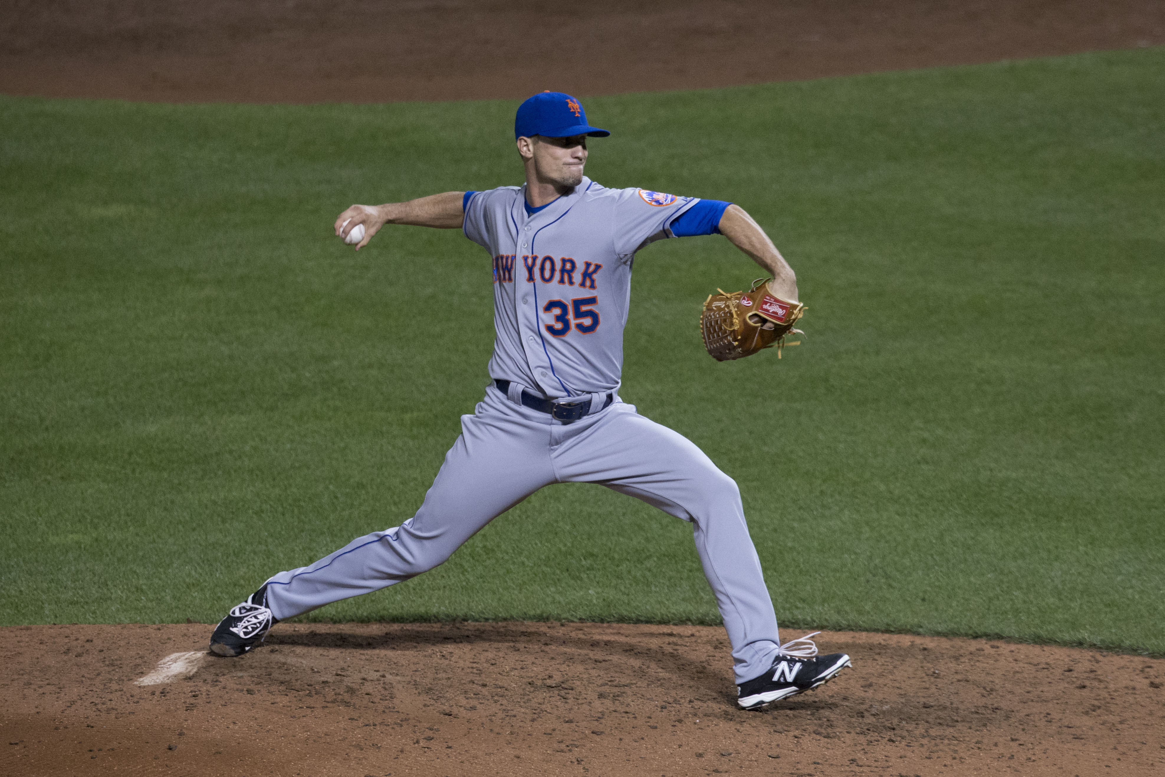 Mets at Orioles 8/19/15